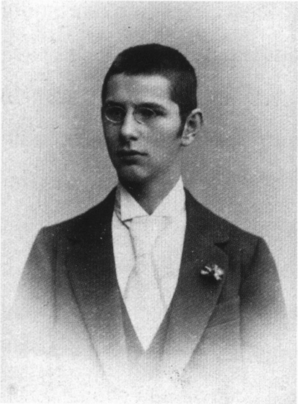 Karl Walter (1877–1940)